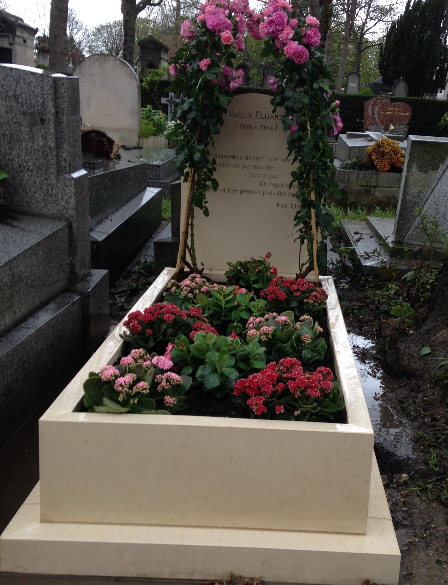 Sépulture de Nusch Éluard (1906-1946), modèle et égérie des surréalistes comme Man Ray et la deuxième épouse du poète Paul Éluard.